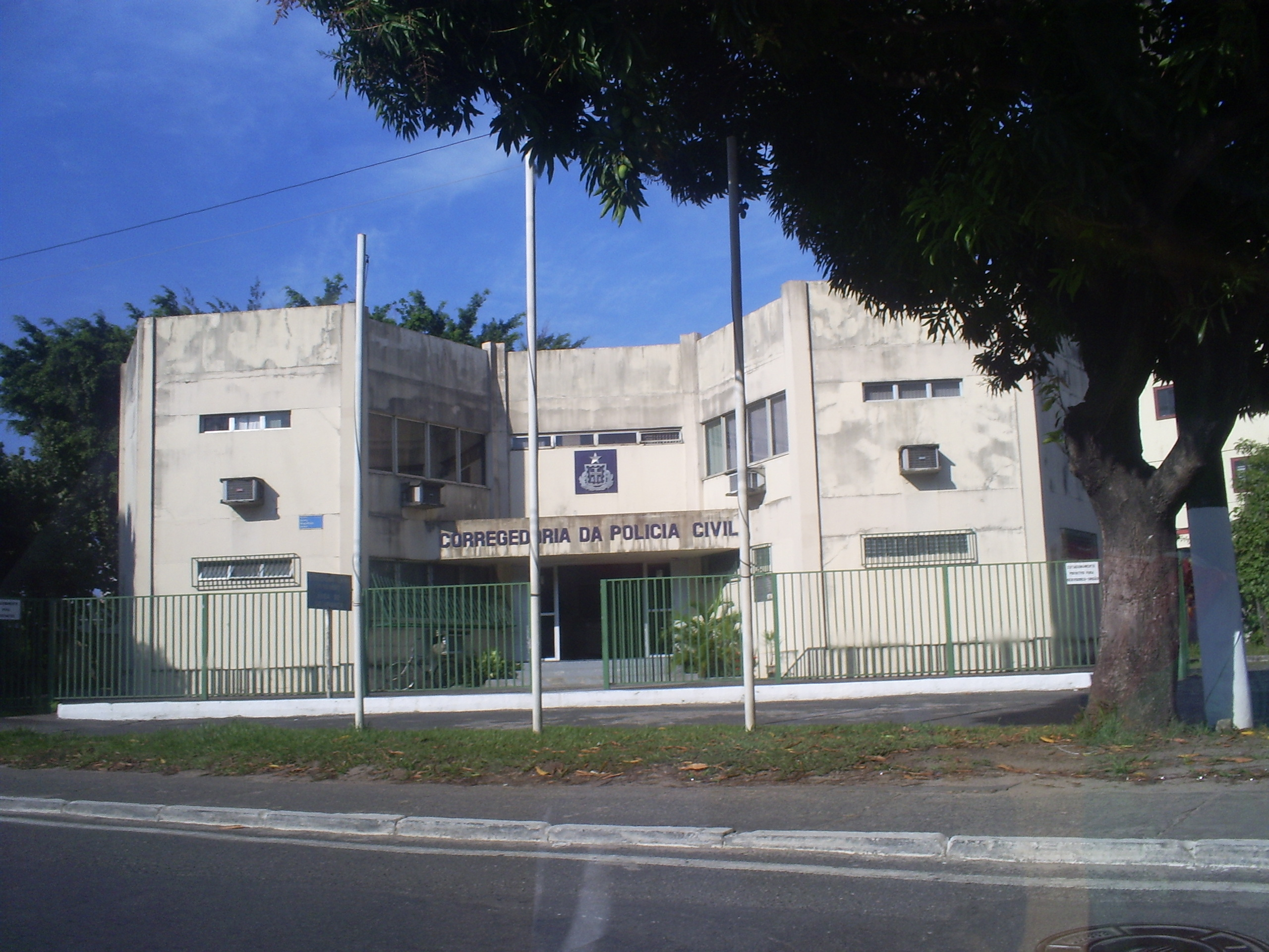 Foto da Corregedoria da Polícia Civil do Estado da Bahia, Rio Vermelho, Salvador, Bahia, Brasil.